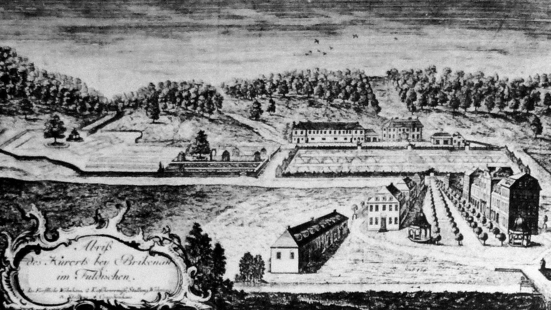 Kupferstich von der Badanlage des Staatsbades Brückenau